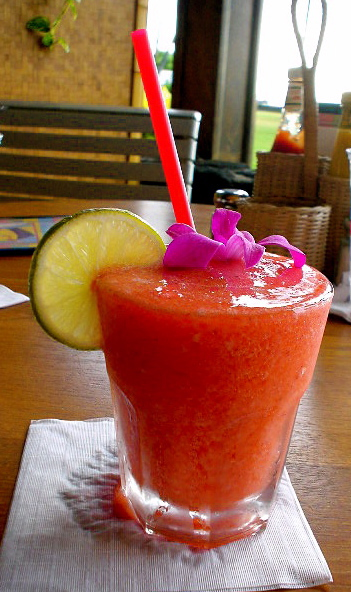 Strawberry Daiquiri, yum.